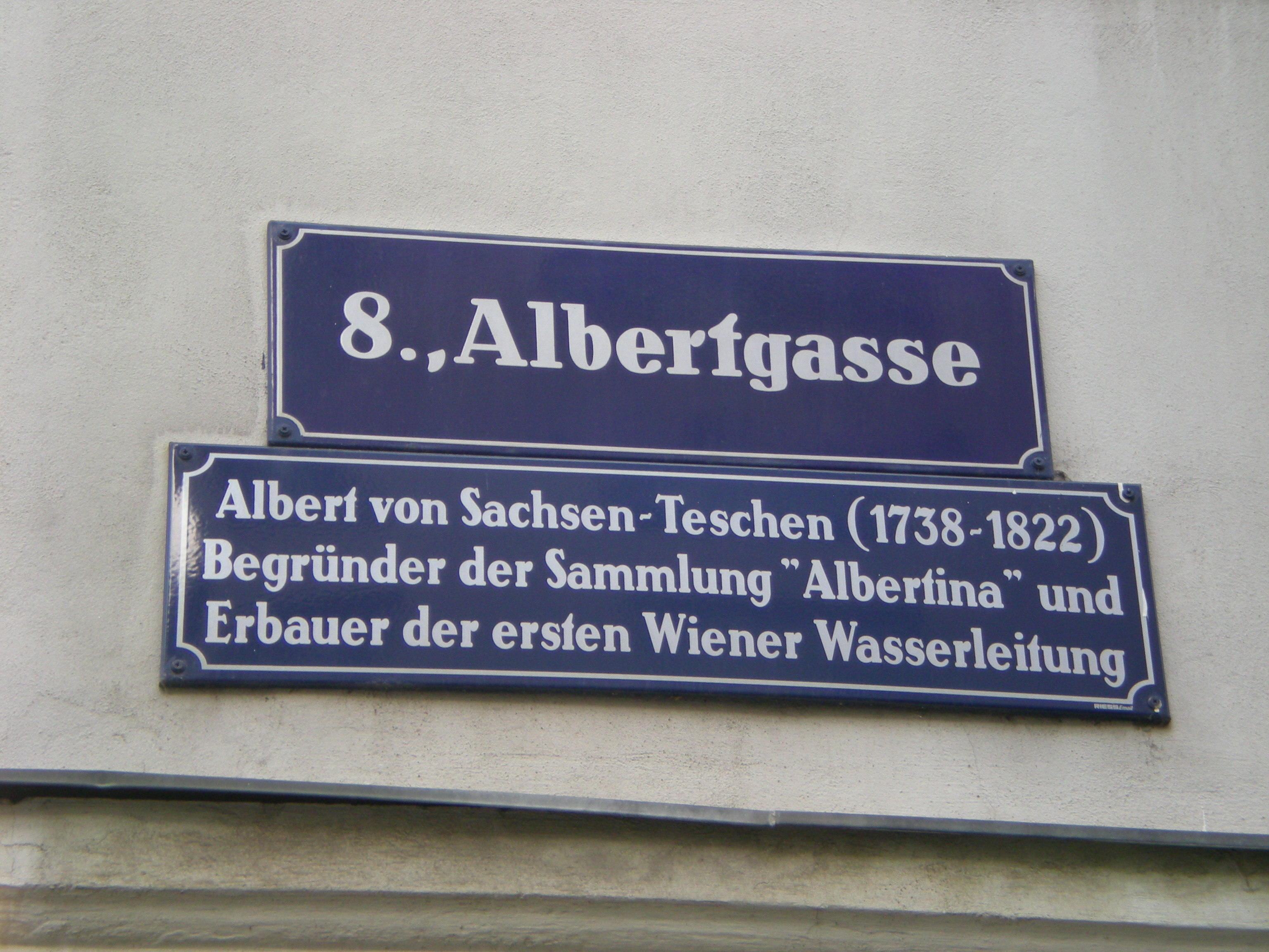 Straßentafel samt Zusatztafel der Albrechtgasse im 8. Wiener Gemeindebezirk Josefstadt